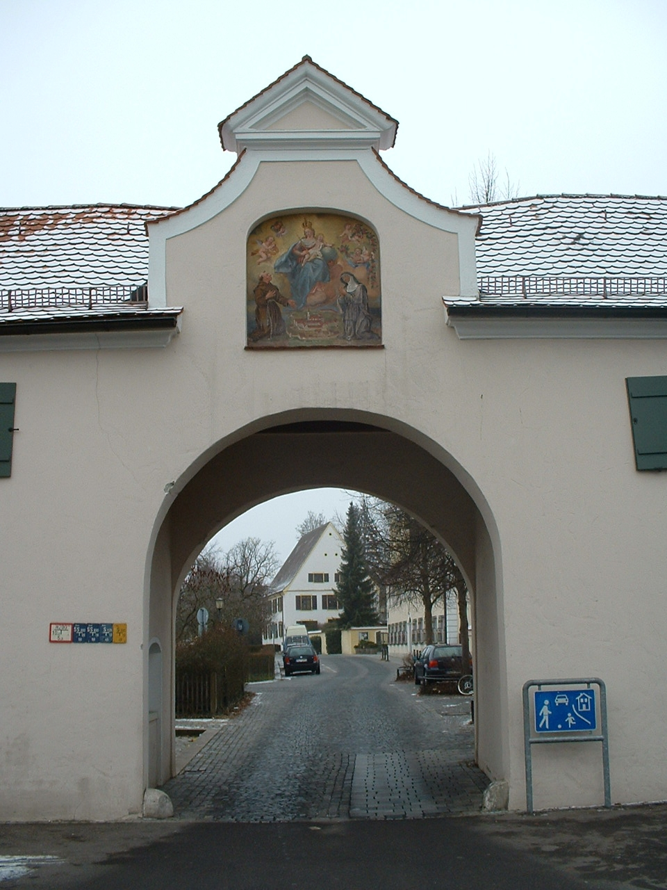 Nördliches Tor zum Klosterhof Söflingen, Stadt Ulm